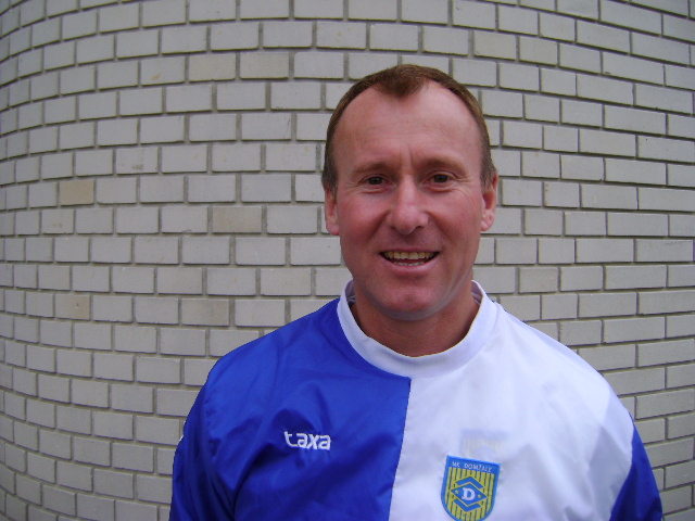 Janez Strajnar